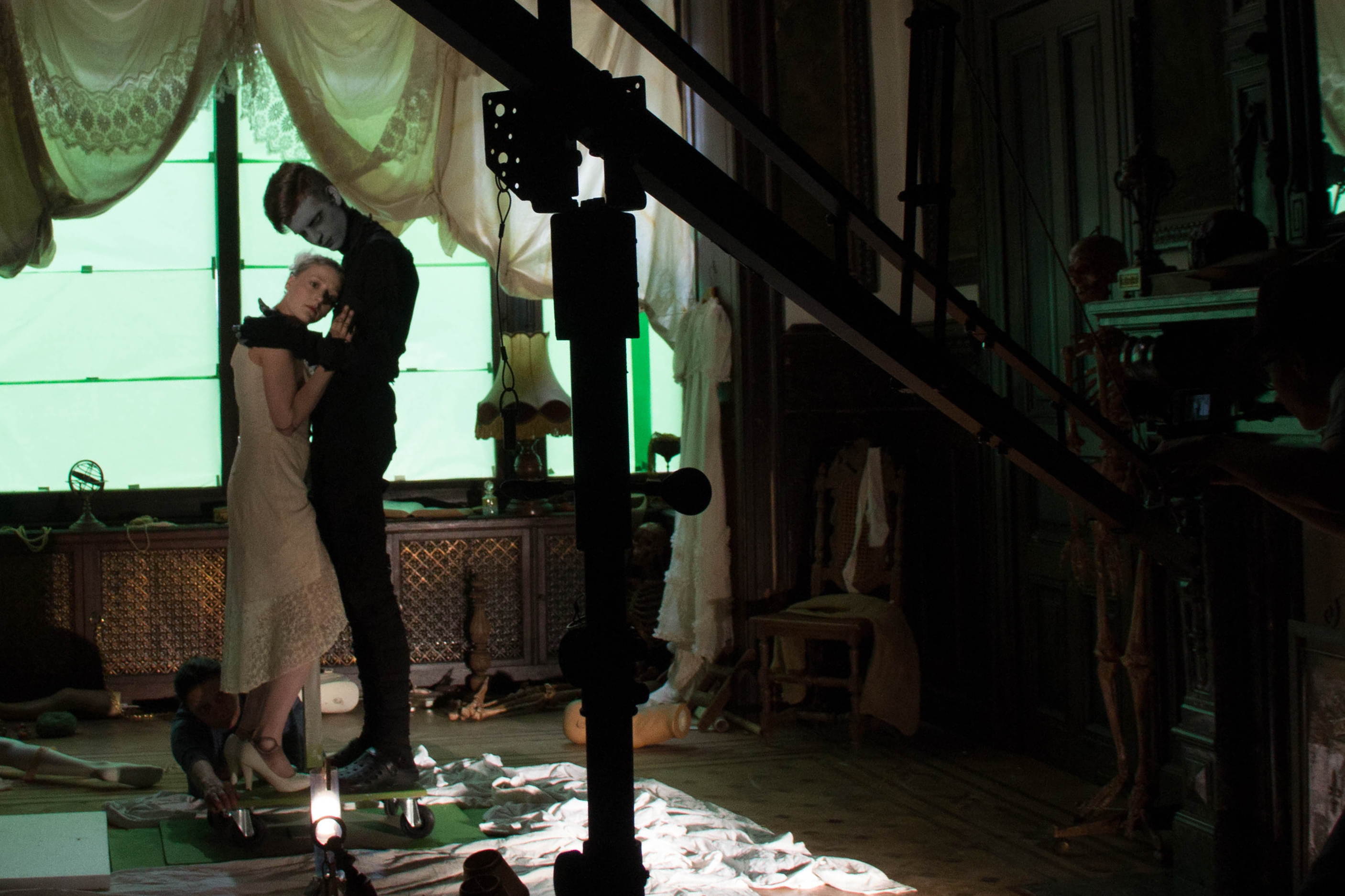 Photo prise sur le tournage de Edgar & la Douze Demoiselle dans l'Ancien Consulat d'Italie de Charleroi